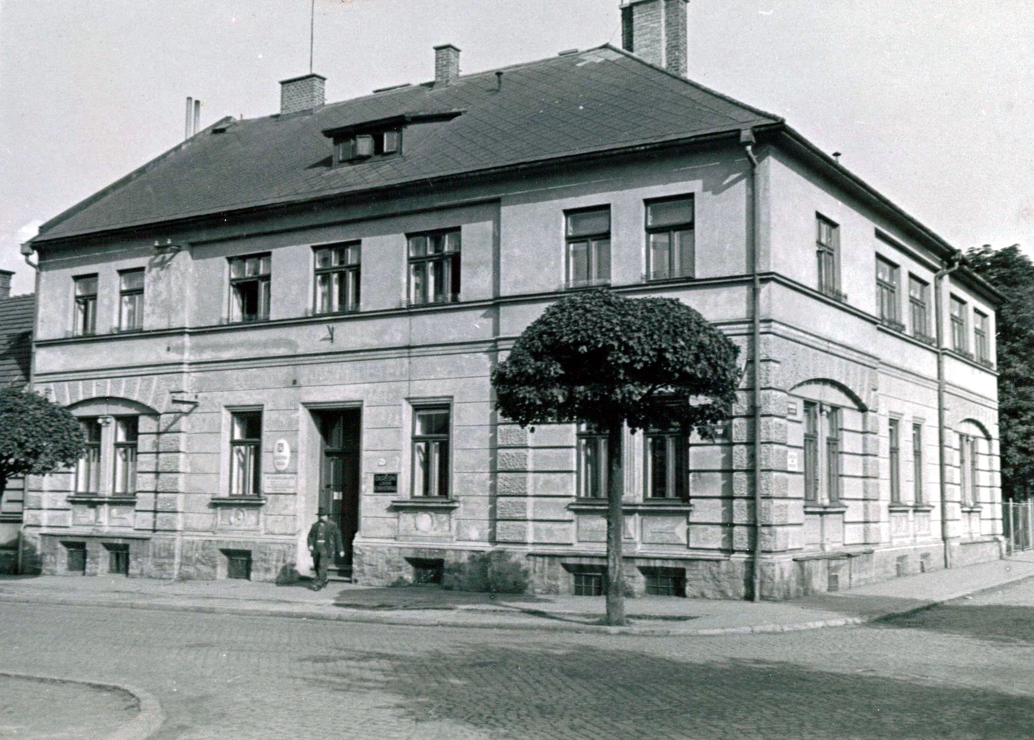 Budova na Svárově, č. p. 714, Vsetín, kde sídlila Okresní knihovna v letech 1957-2006